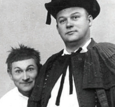 Valentin Šindler a jeho mladší bratr Václav jako stréček Křópal a Jozéfek Melhoba